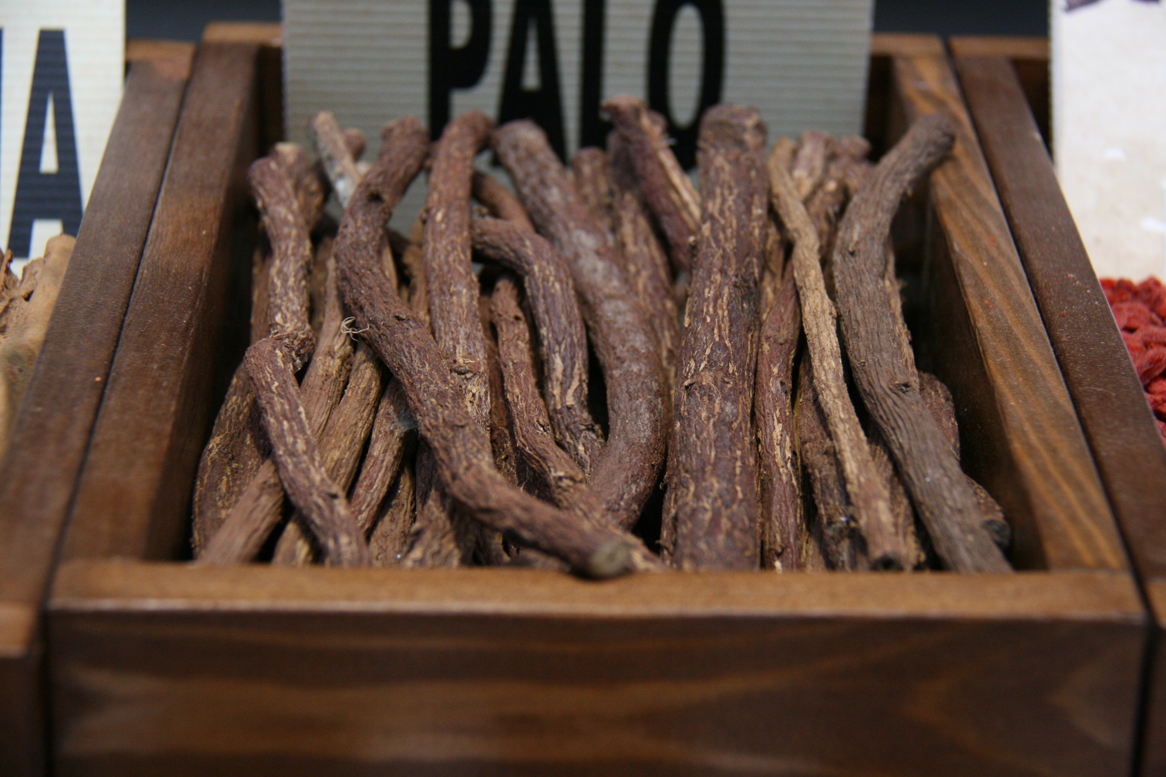 Palo de regaliz